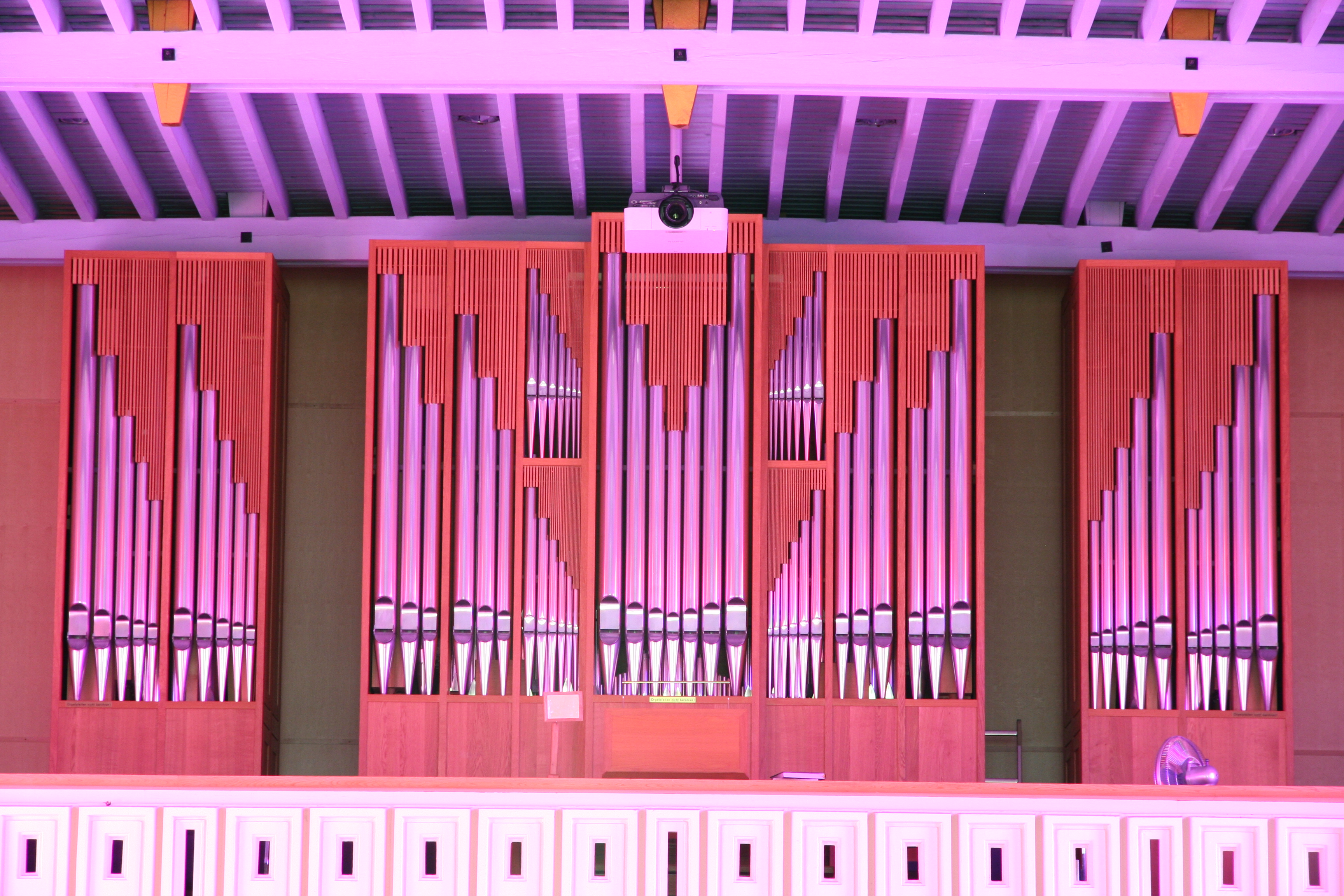 Römisch-katholische Pfarrkirche St. Martin Meilen